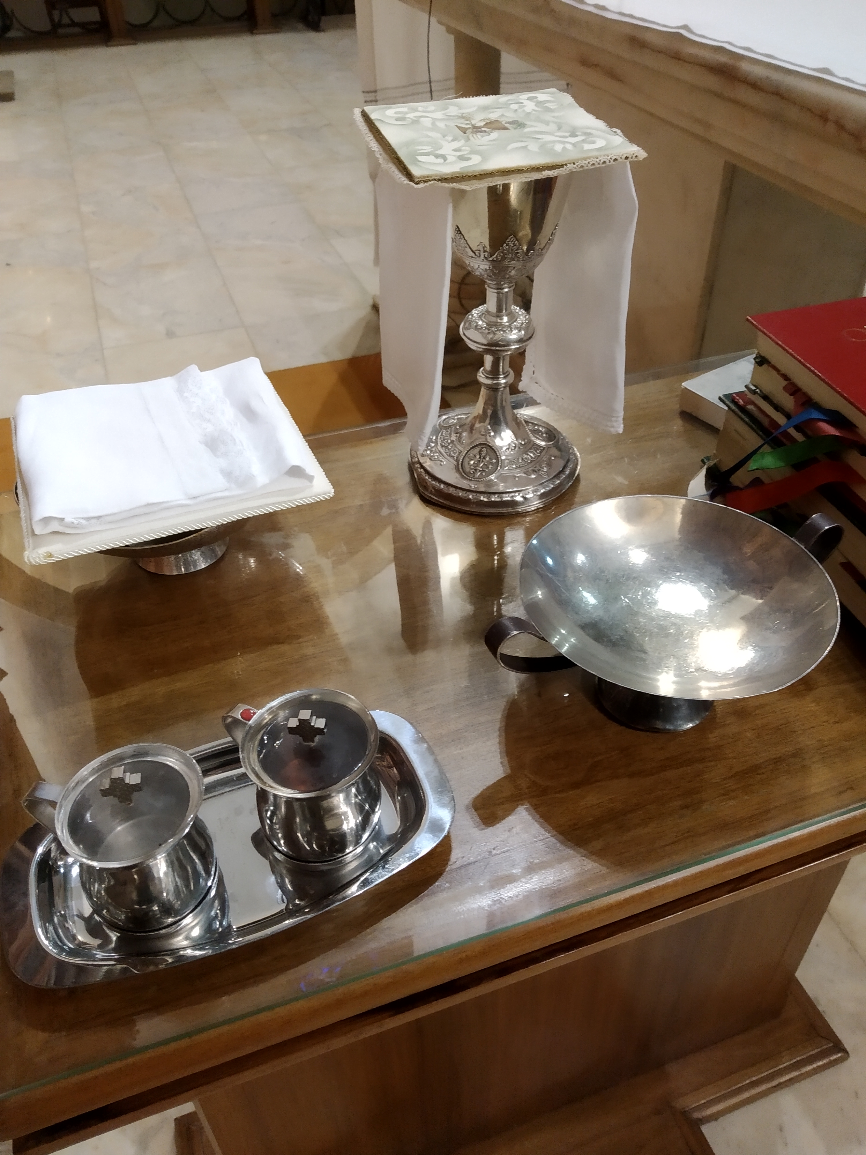 San Andres Eliza (Eibar) Irudi hau Wikibizi kanpainaren baitan igo da, Euskal Wikilarien Kultura Elkarteak 2020an deitutako argazki lehiaketa hirukoitza. Helburua, Euskal Herria hobeto ezagutzen laguntzea da.Lagundu zuk ere irudi hau dagokion artikuluetan txertatzen.